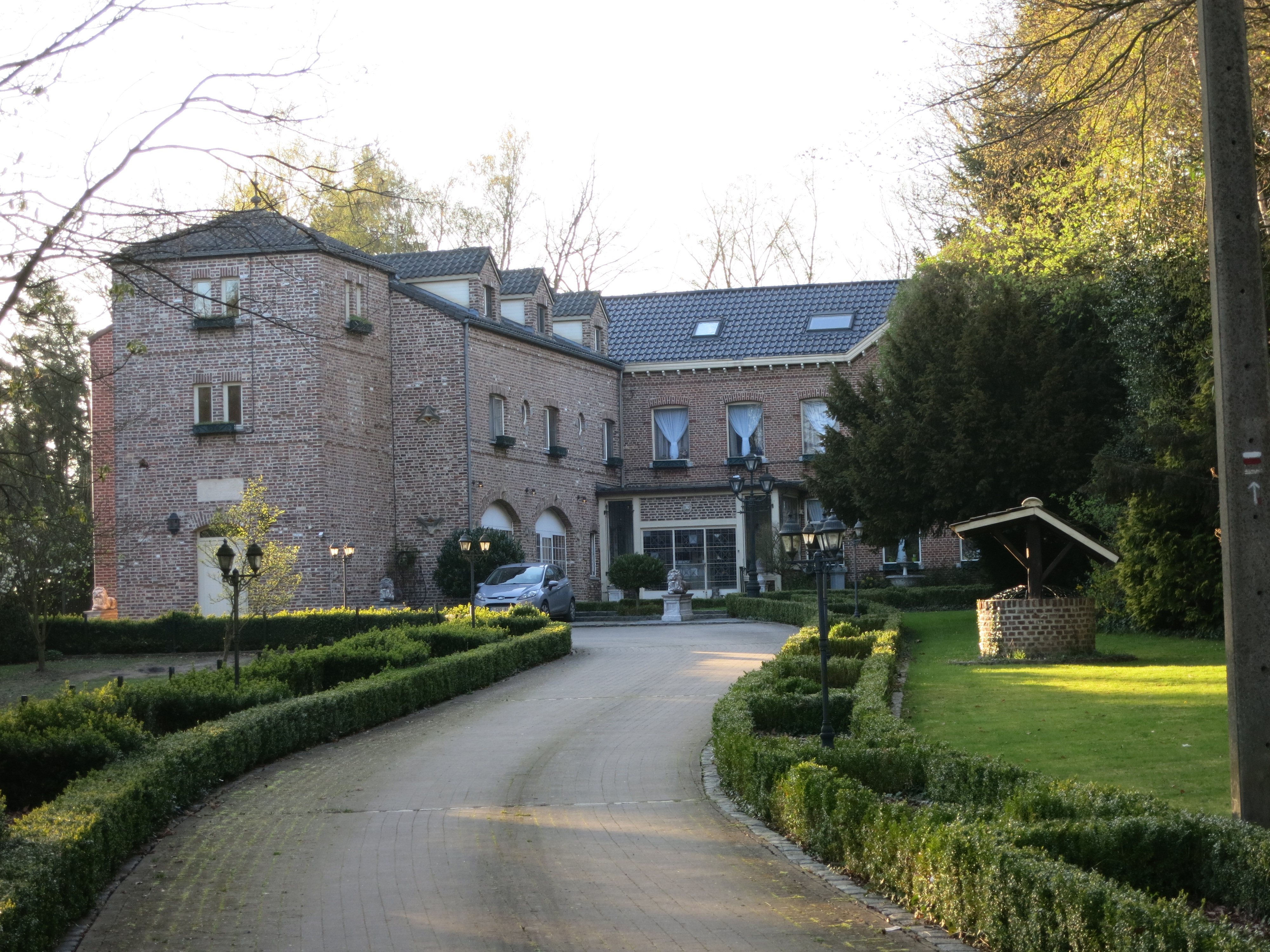 Appartementen in deel van Kasteel Brandenpoel Alken